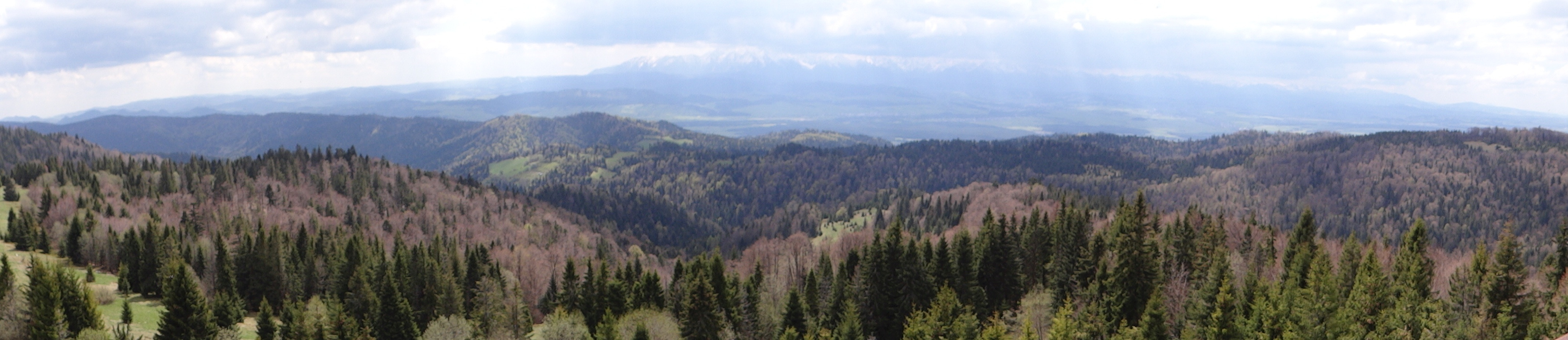 Panorama widokowa z wieży na Magurkach